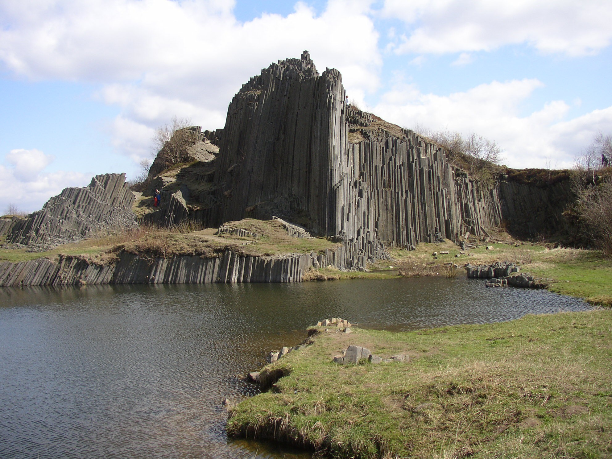 Panská skála , , Czech republic